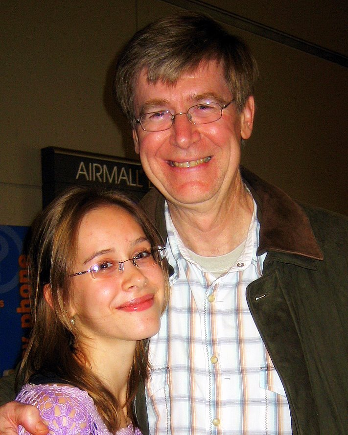 Ken Strauss and his daughter, Natalia